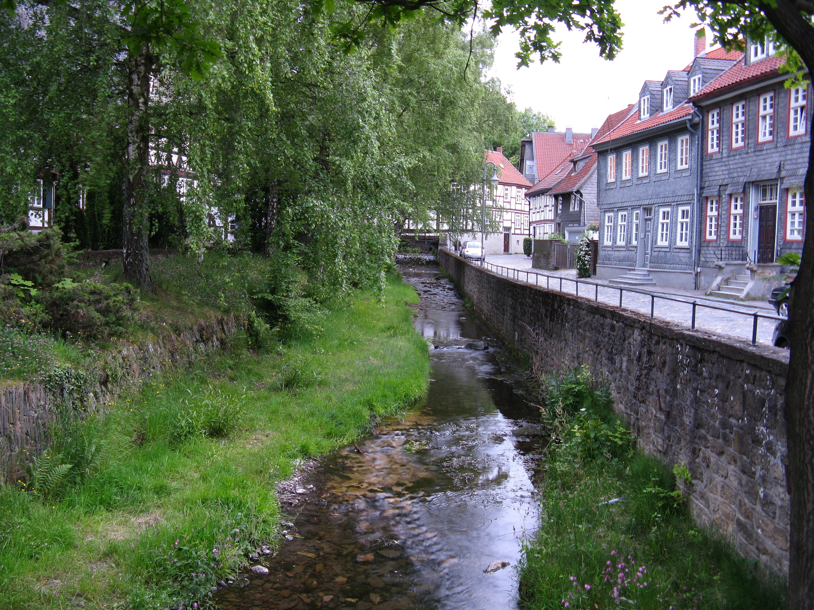 Die Abzucht in Goslar